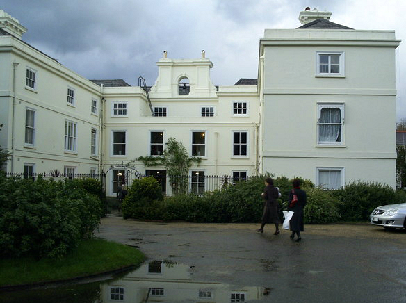 Front of Morden Hall in Morden Park